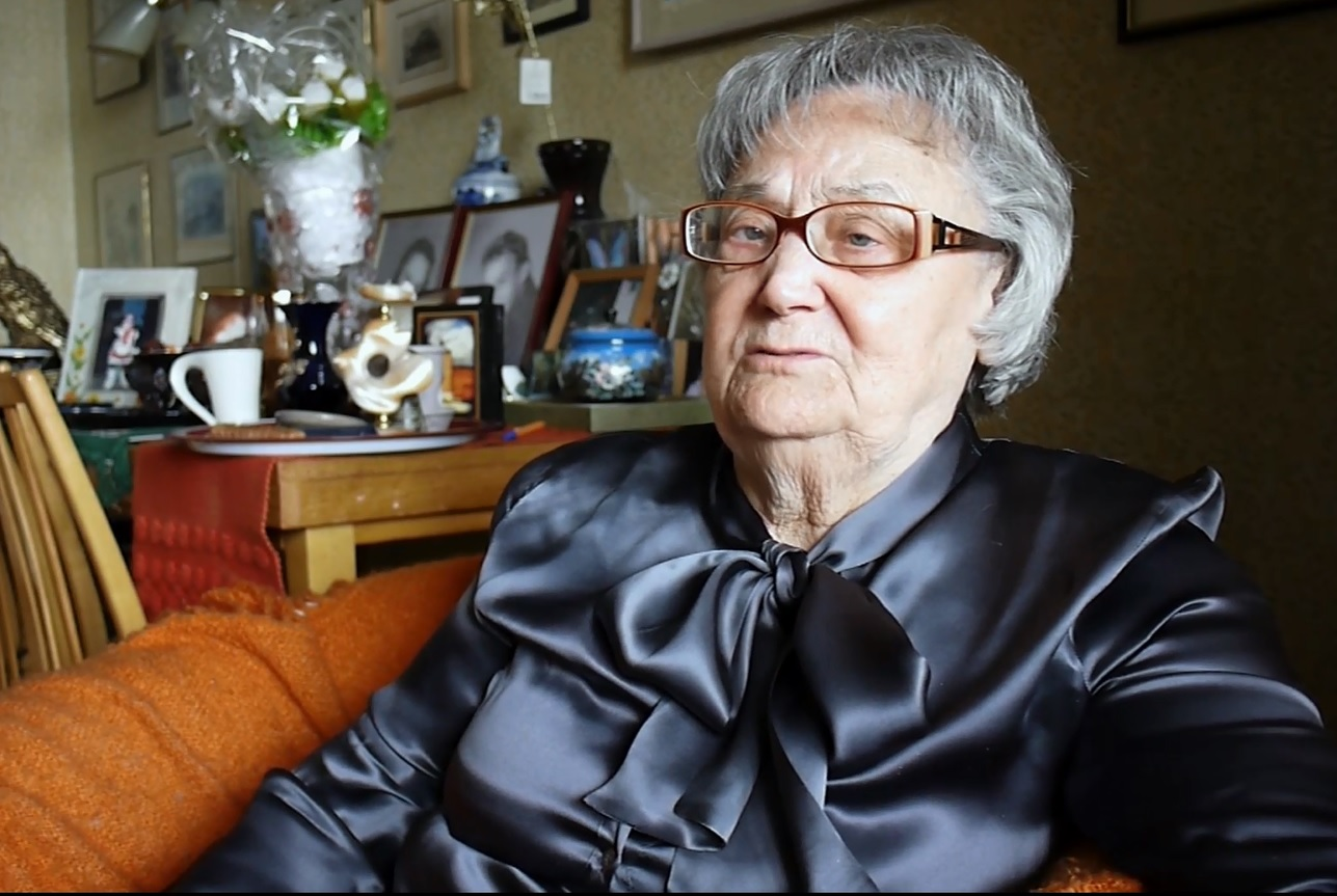 Фото Н. М. Римашевской.